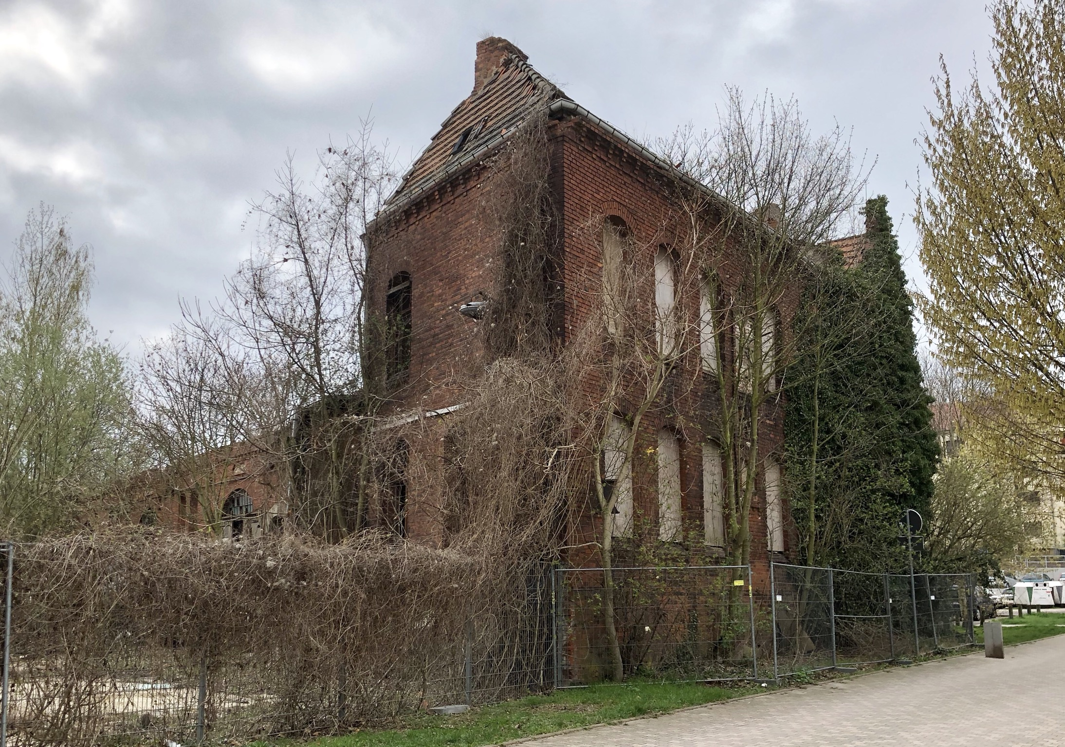 Lage Sülzeberg